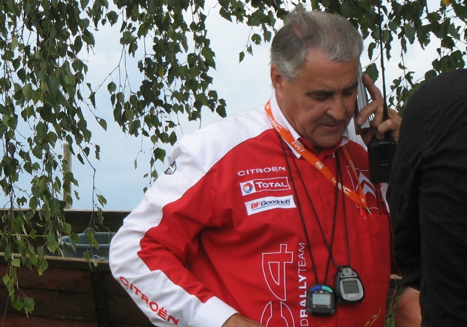 Rallye d'Allemagne 19.08.2007